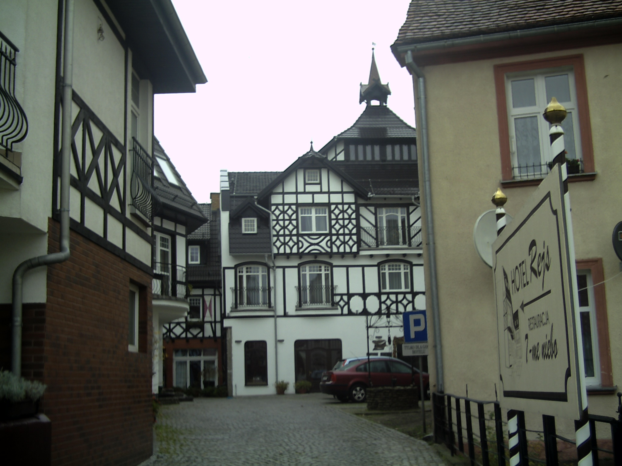 Ustka, ul. Marynarki Polskiej